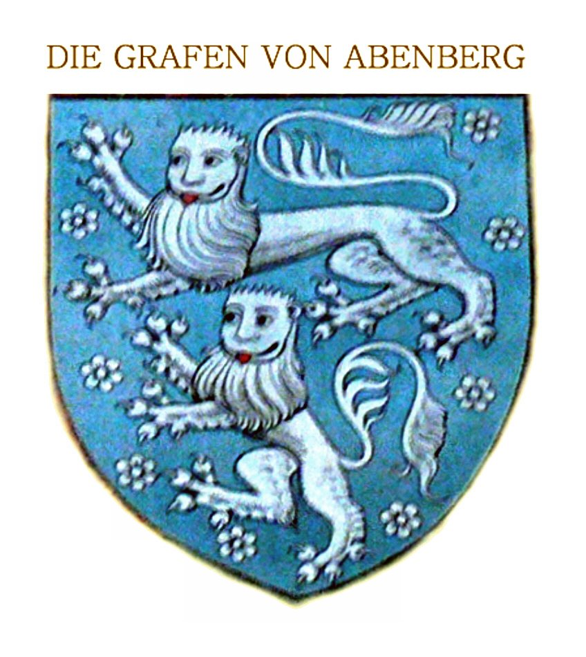 Wappen der fränkischen Grafen von Abenberg